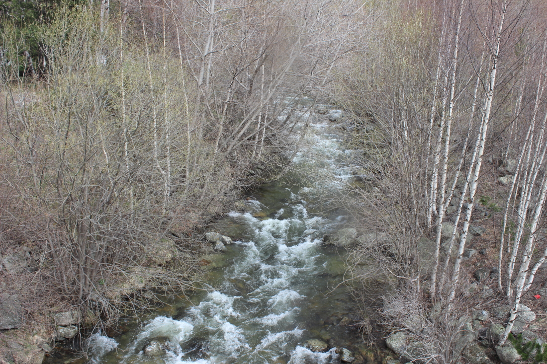 Rio Carol desde la estación de Porté Puymorens